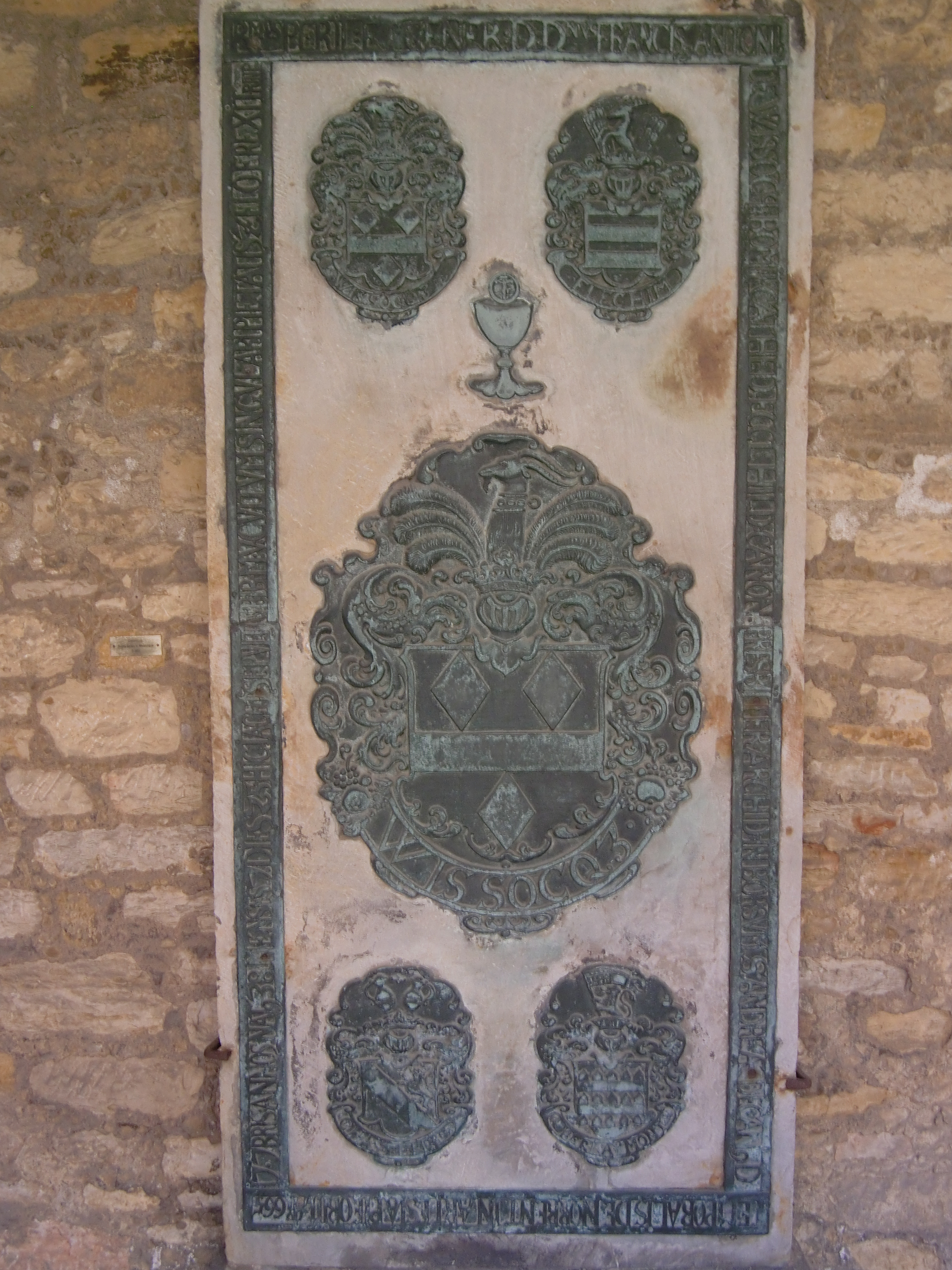 Dom zu Hildesheim, Kreuzgang, Grabplatte für Franz Anton von Wissocque († 1665)